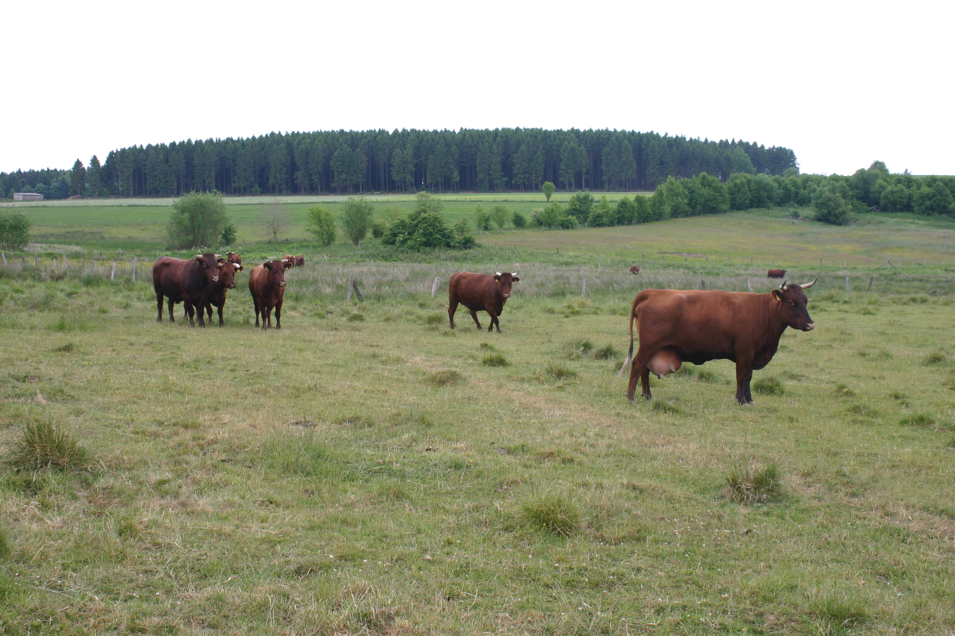 Rotes Höhenvieh des "Verein für Natur- und Vogelschutz im Hochsauerlandkreis" im Naturschutzgebiet Hemmeker Bruch nördlich Brilon-Madfeld, Hochsauerlandkreis, NRW